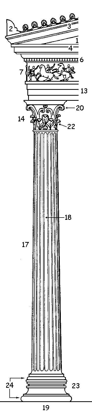 תרשים הסדר הקורינתי.